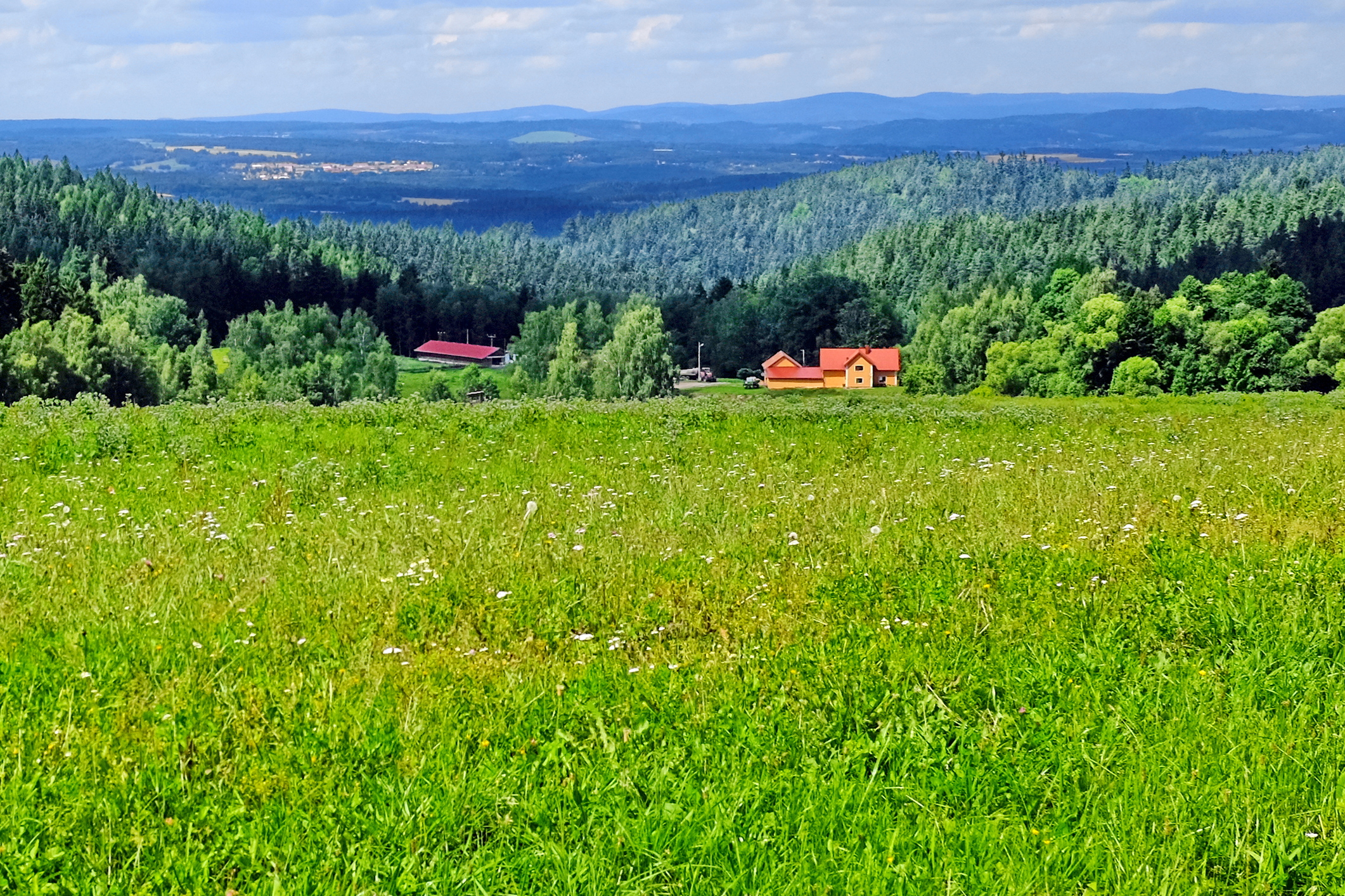 Osada Dvorečky (Kynšperk nad Ohří), ve Slavkovském lese, pohled z dálky od seseru, okres Sokolov